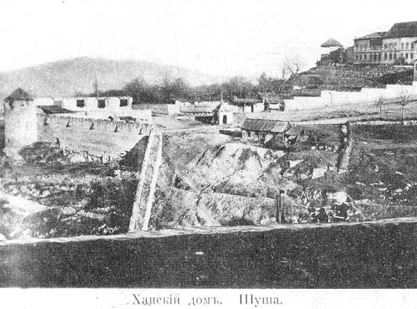 Divanxana meydanının ərazisi Qarabağ xan sarayının qala divarları daxilində, XIX əsrin əvvəlləri